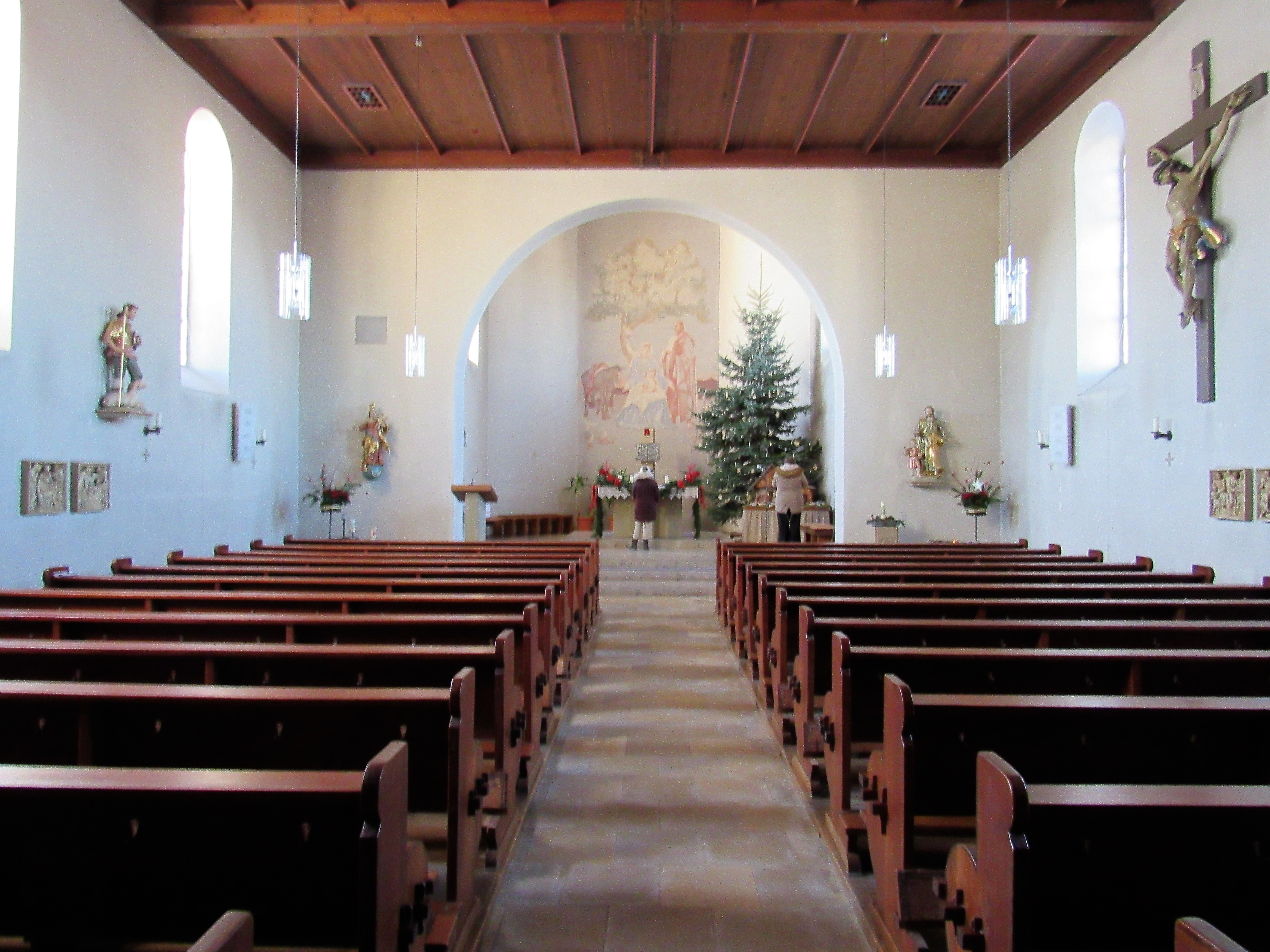 Kirche Schönderling innen